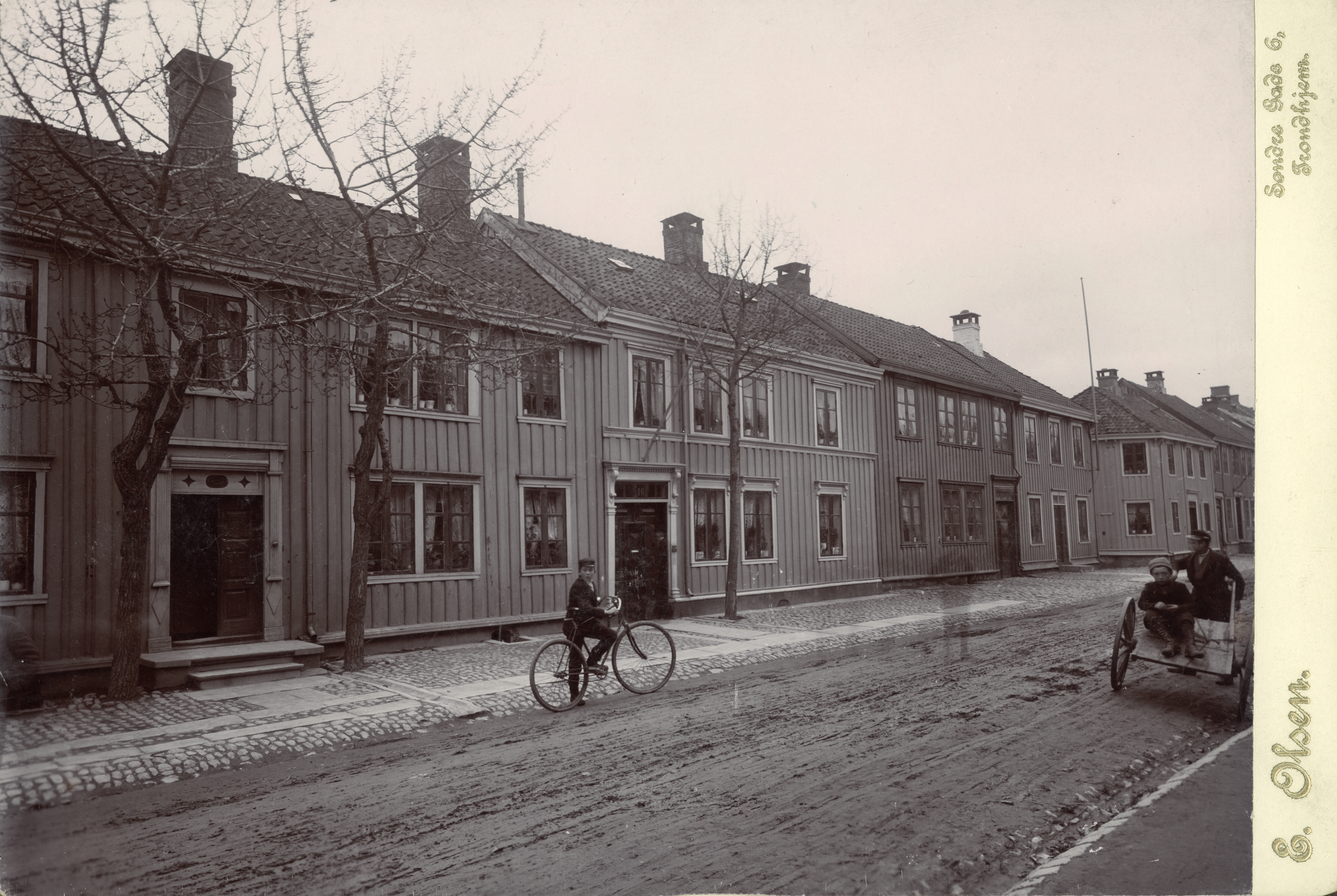 Søndre gate 6 i Trondheim, Sør-Trøndelag This image on crowdsourcing geotagging platform Fotodugnad